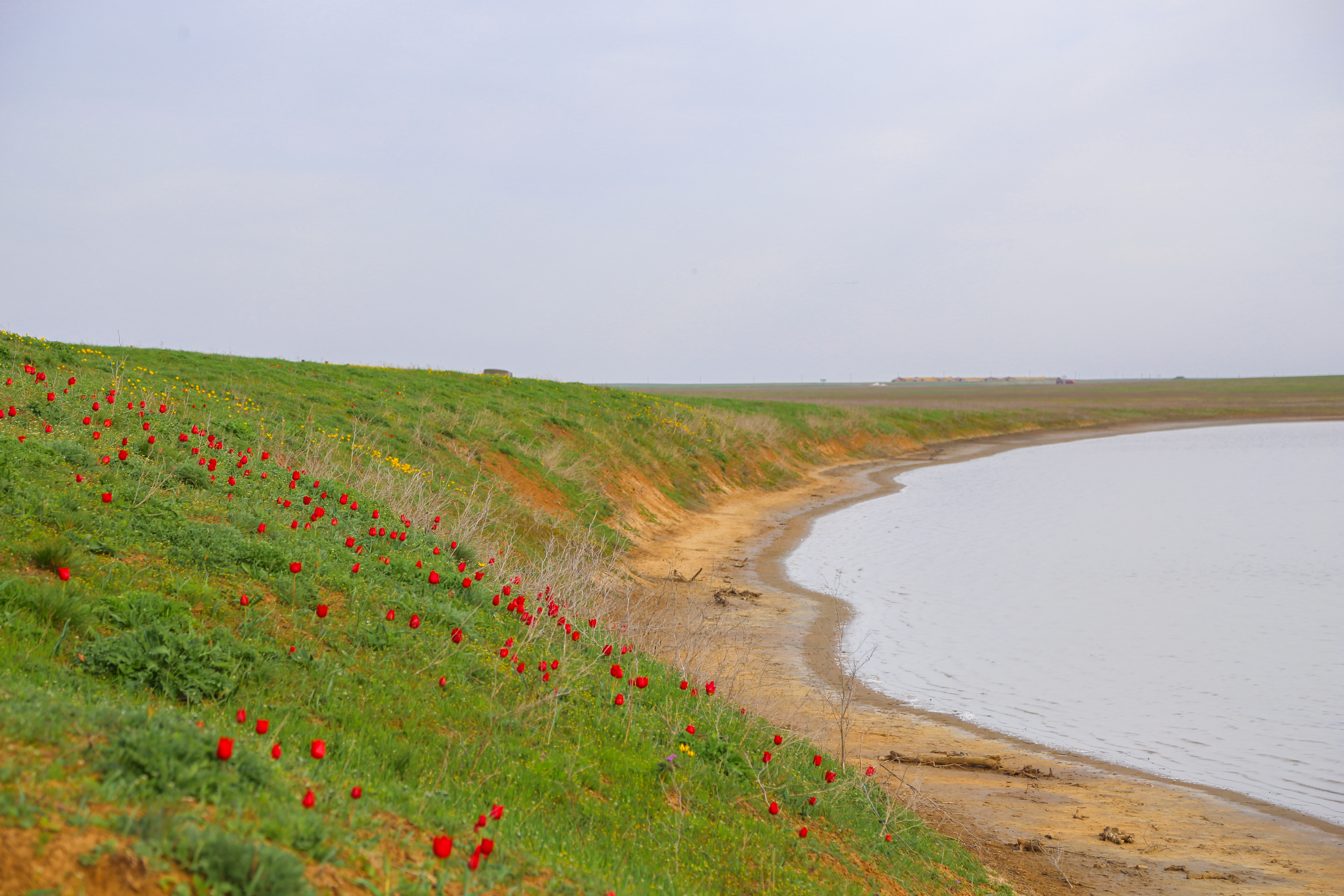 Буферная зона заповедника "Ростовский", цветение диких тюльпанов Геснера и Биберштейна